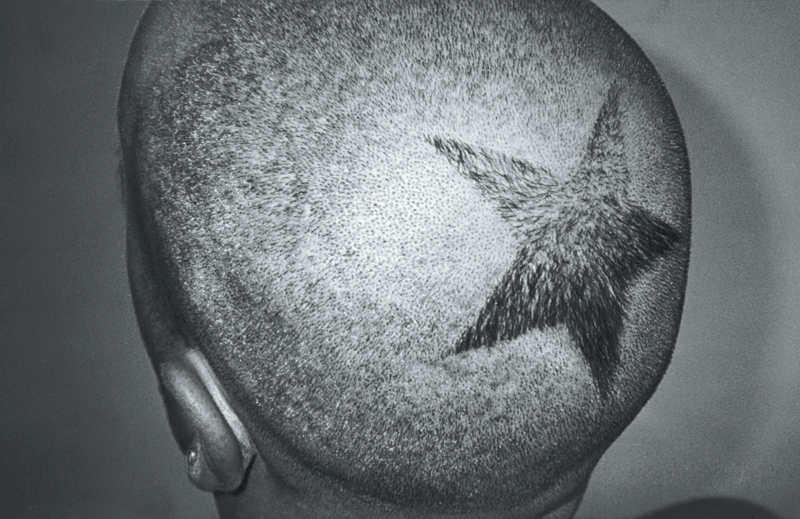 Uroš Đurić